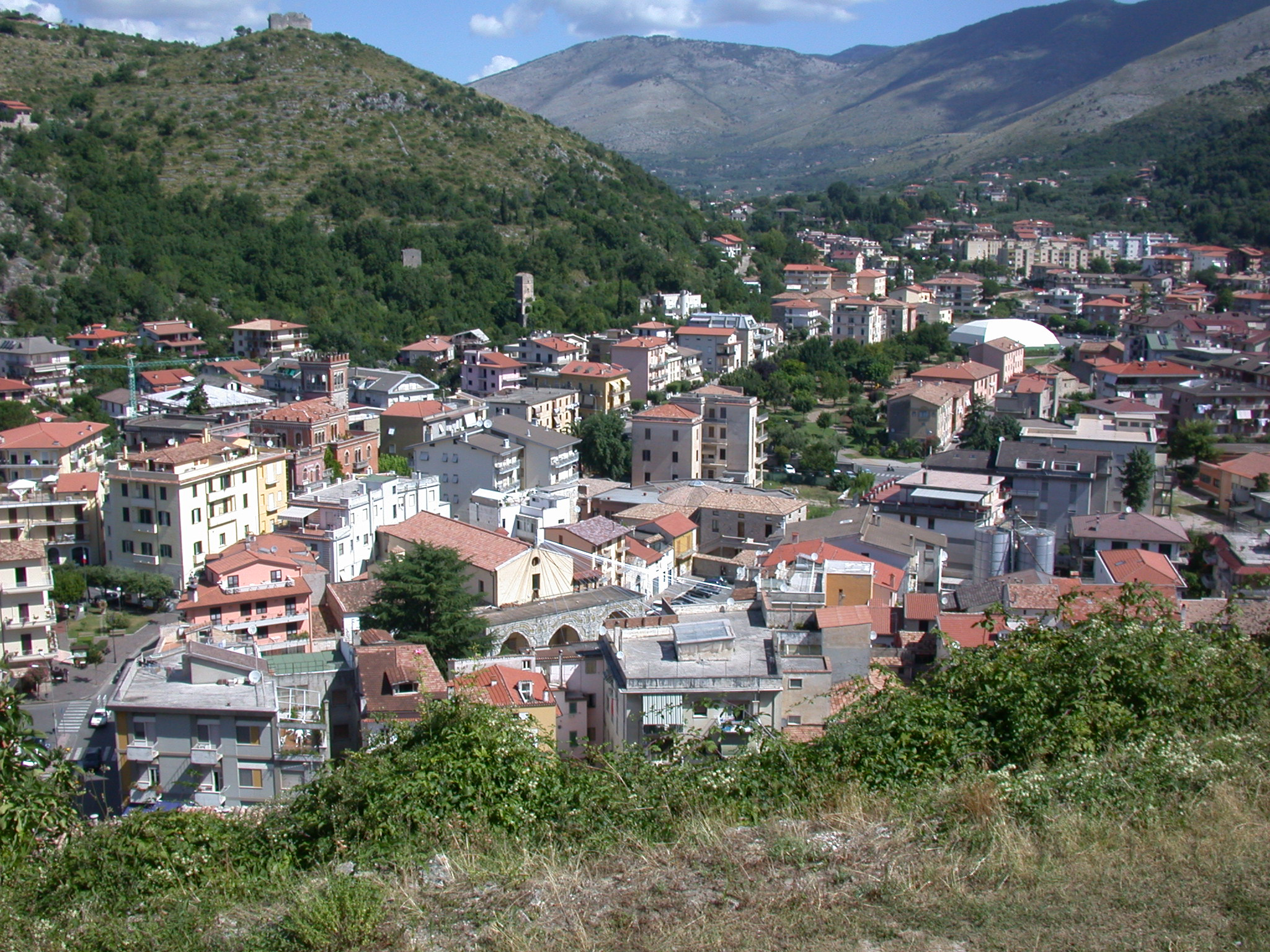 Itri, provincia di Latina, regione Lazio, Italia. Città bassa, panorama dal Castello